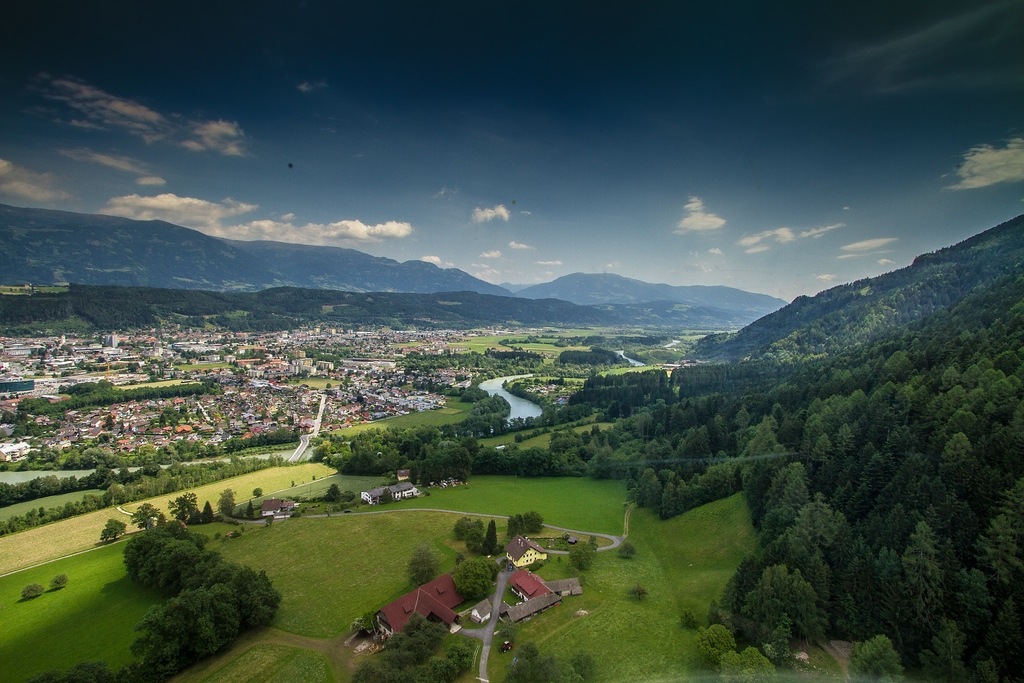 Unterwegs mit der Goldeck-Bahn. Links: Spittal an der Drau.